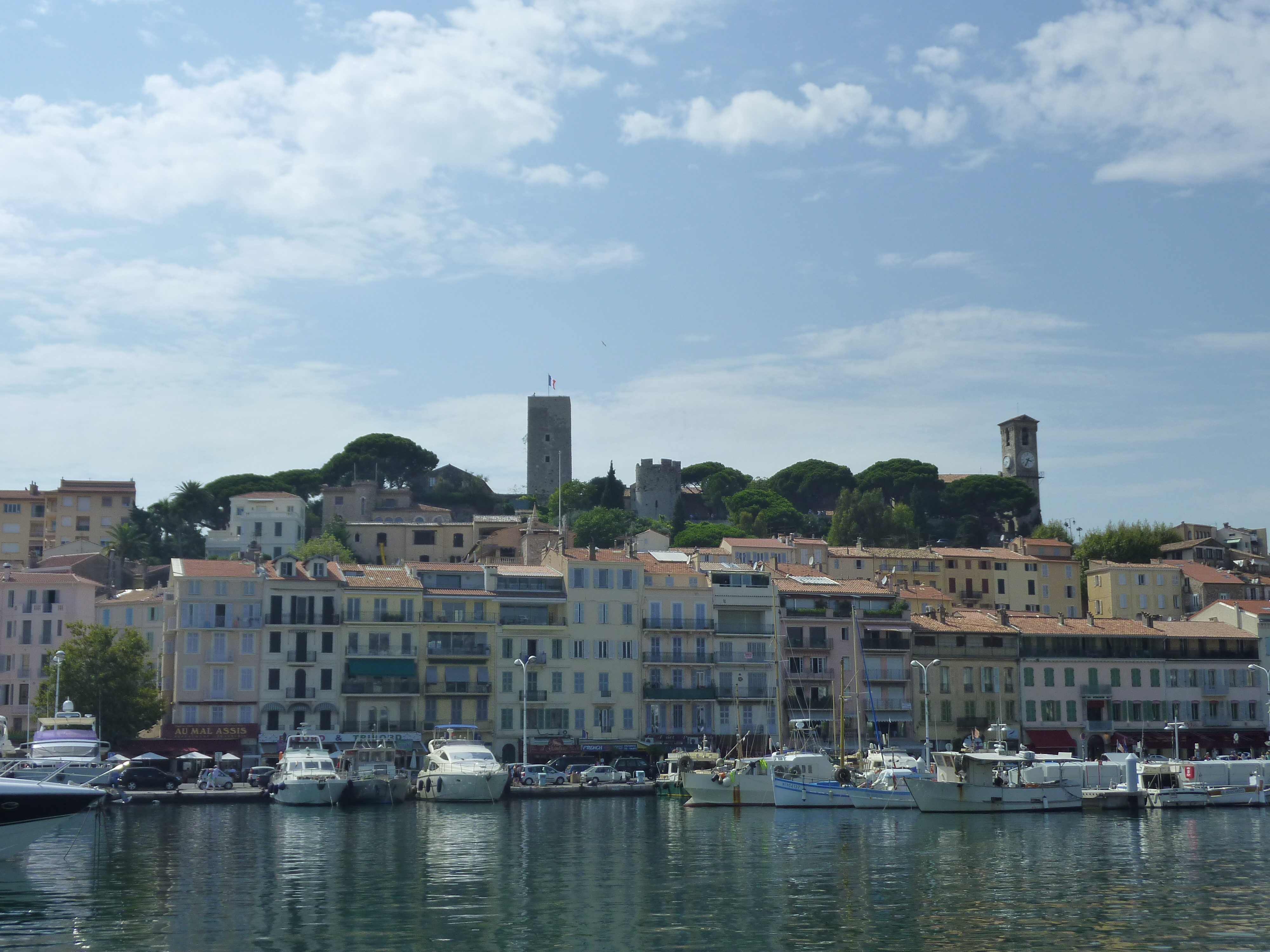 Vue du vieux Cannes depuis le Port. On distingue le Suquet. Alpes-Maritimes, France. .